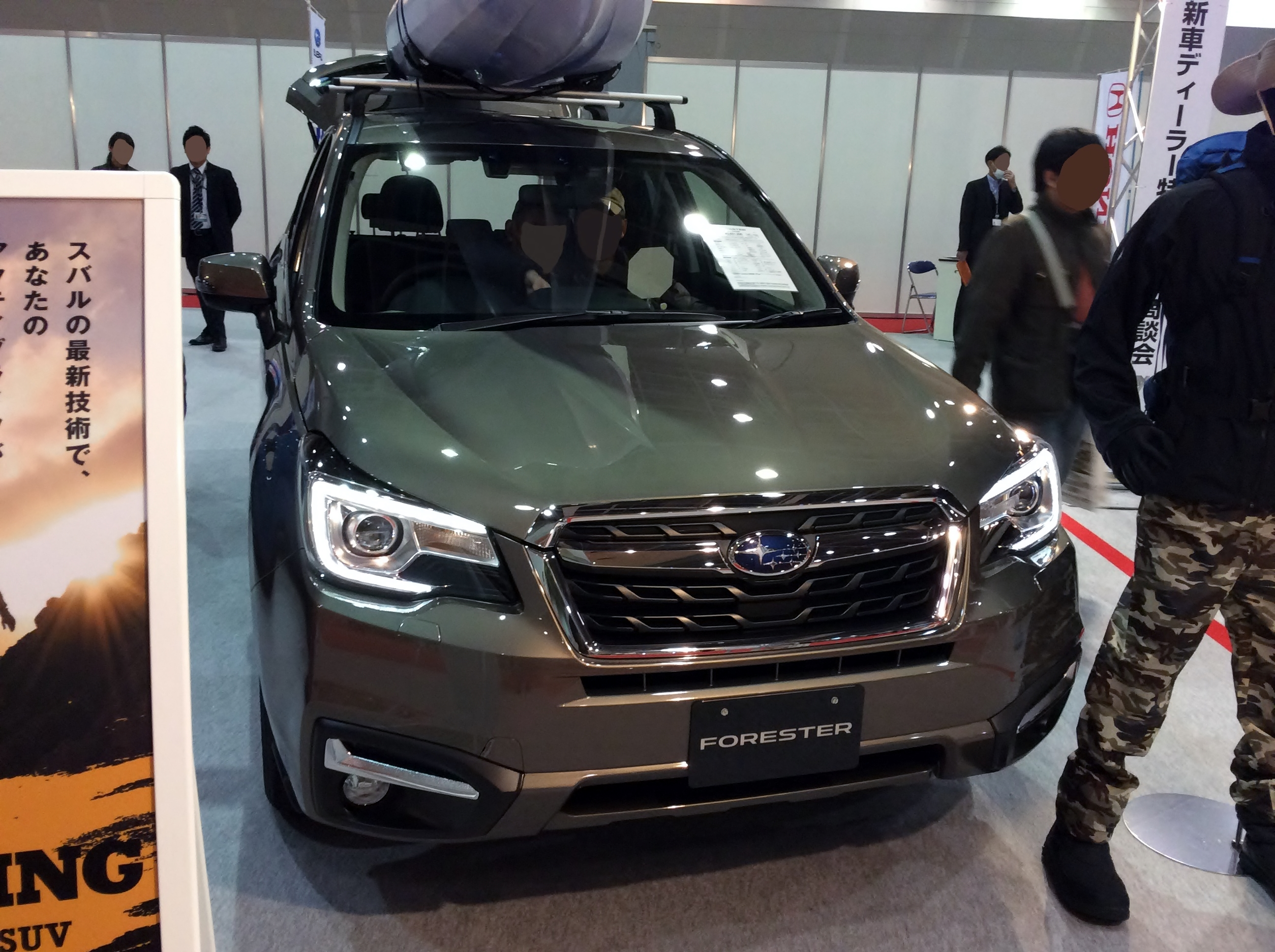 大阪モーターショー2015においてDBA-SJ5型スバル・フォレスター2.0i-Lアイサイトを撮影。